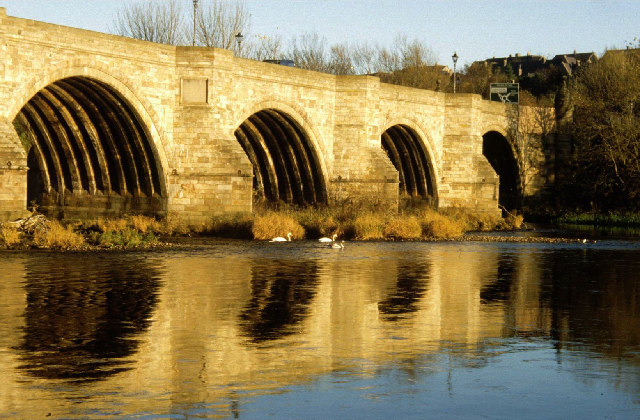 Bridge of Dee at Aberdeen